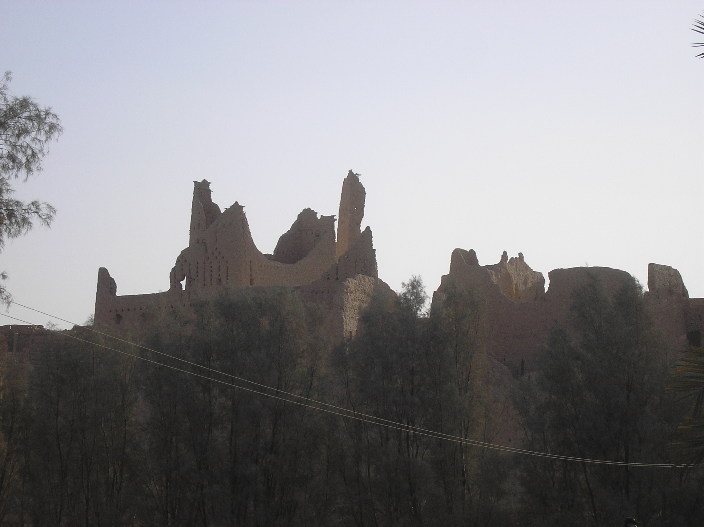 Diriyyah